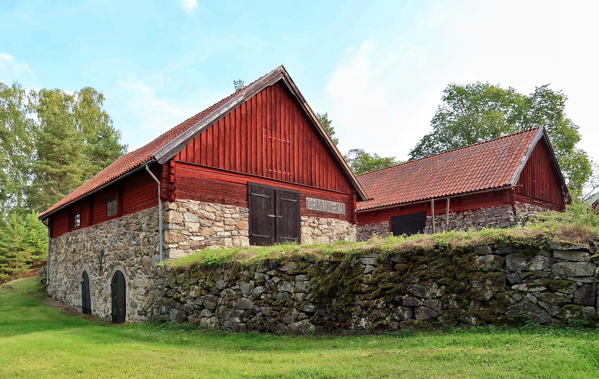 Tunabergs gruvmuseum är ett arbetslivsmuseum om gruvdriften i Tuna bergslag i Koppartorp 24 kilometer söder om Nyköpings tätort.